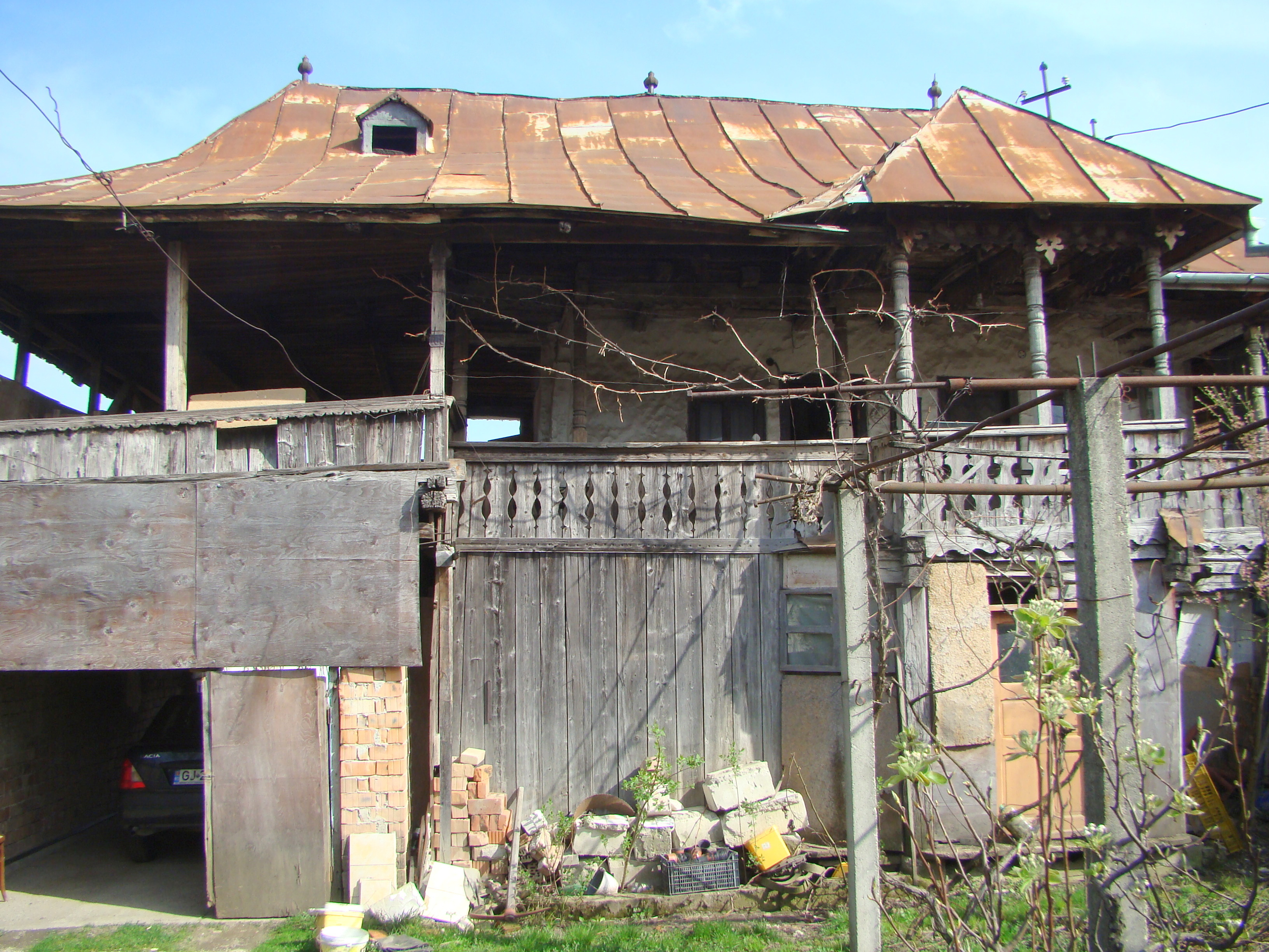 Casa Manta, sat Turcinești; comuna Turcinești, judeţul Gorj